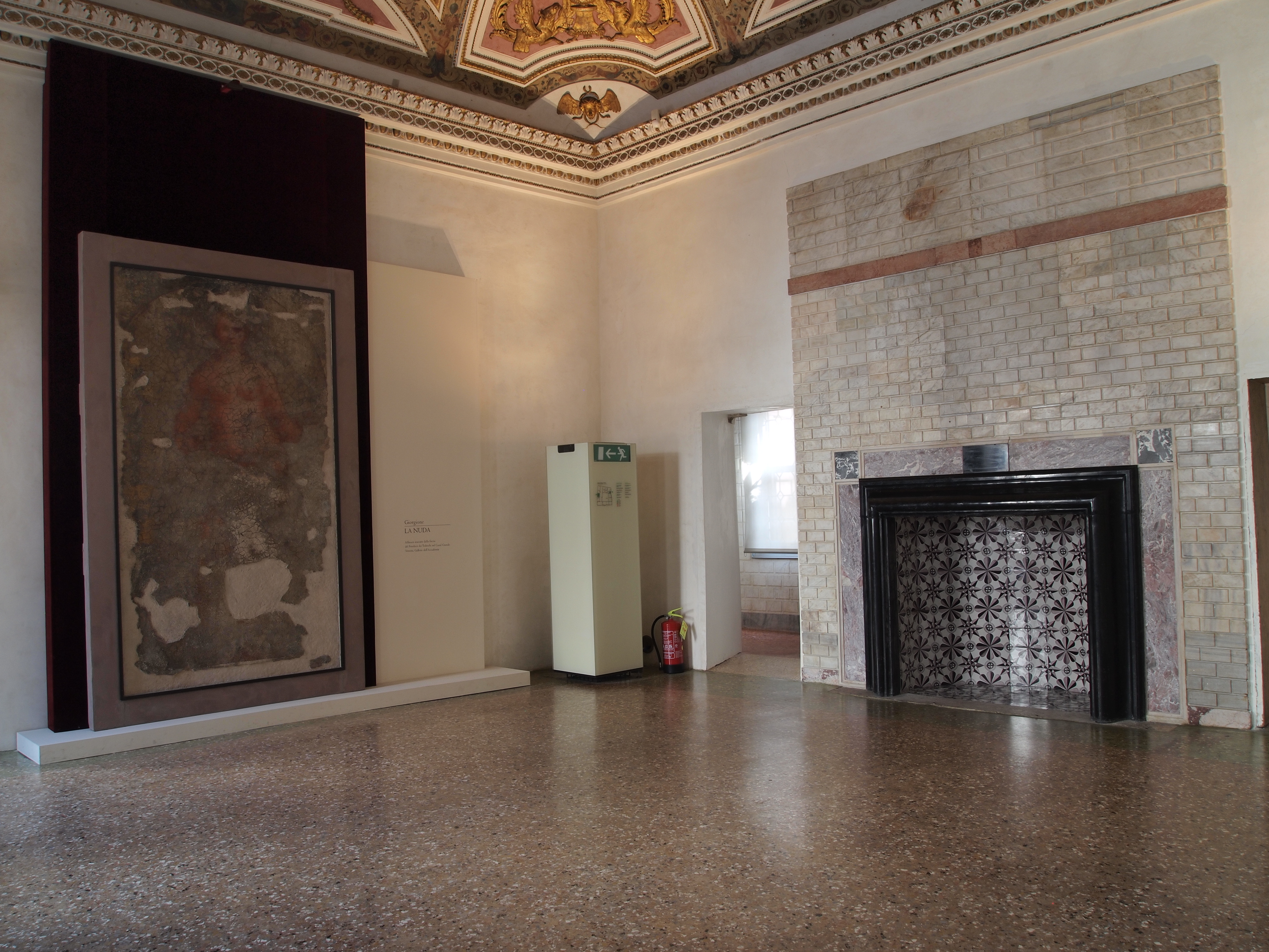 Museo di Palazzo Grimani (Castello) - MIBAC This is a photo of a monument which is part of cultural heritage of Italy.